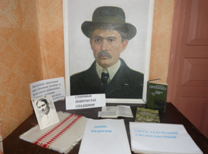 Виставка у Никонівській сільській бібліотеці, присвячена Михайлу Івченку.